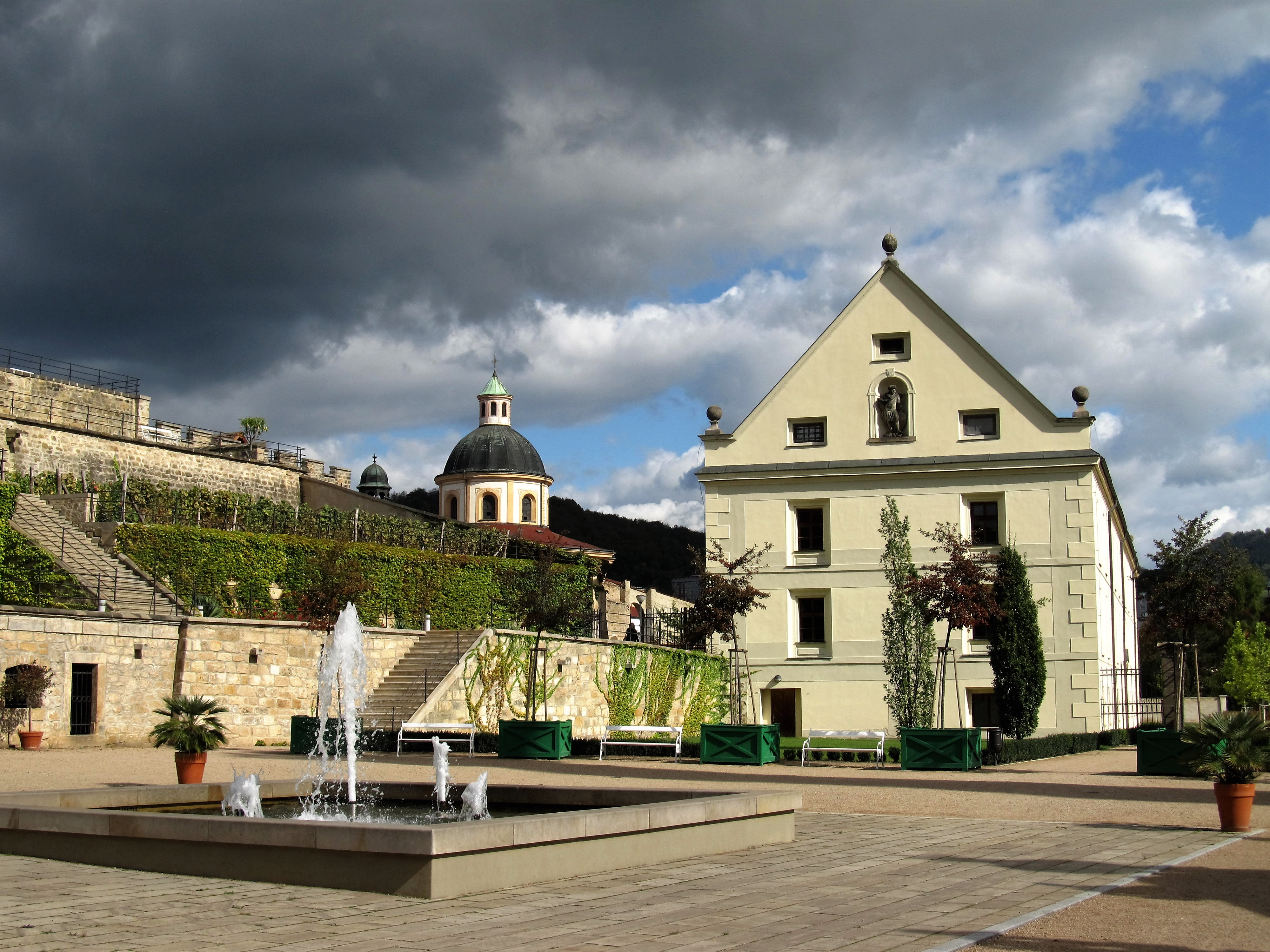 Zámecká sýpka a kostel Povýšení sv. Kříže z terasovité zahrady pod zámkem